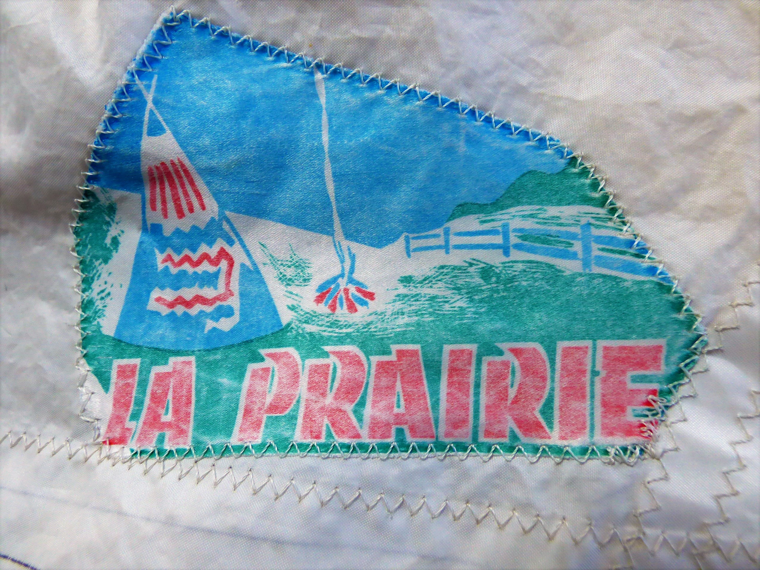 Étiquette La Prairie sur une voile de dériveur zef identifiant son fabricant